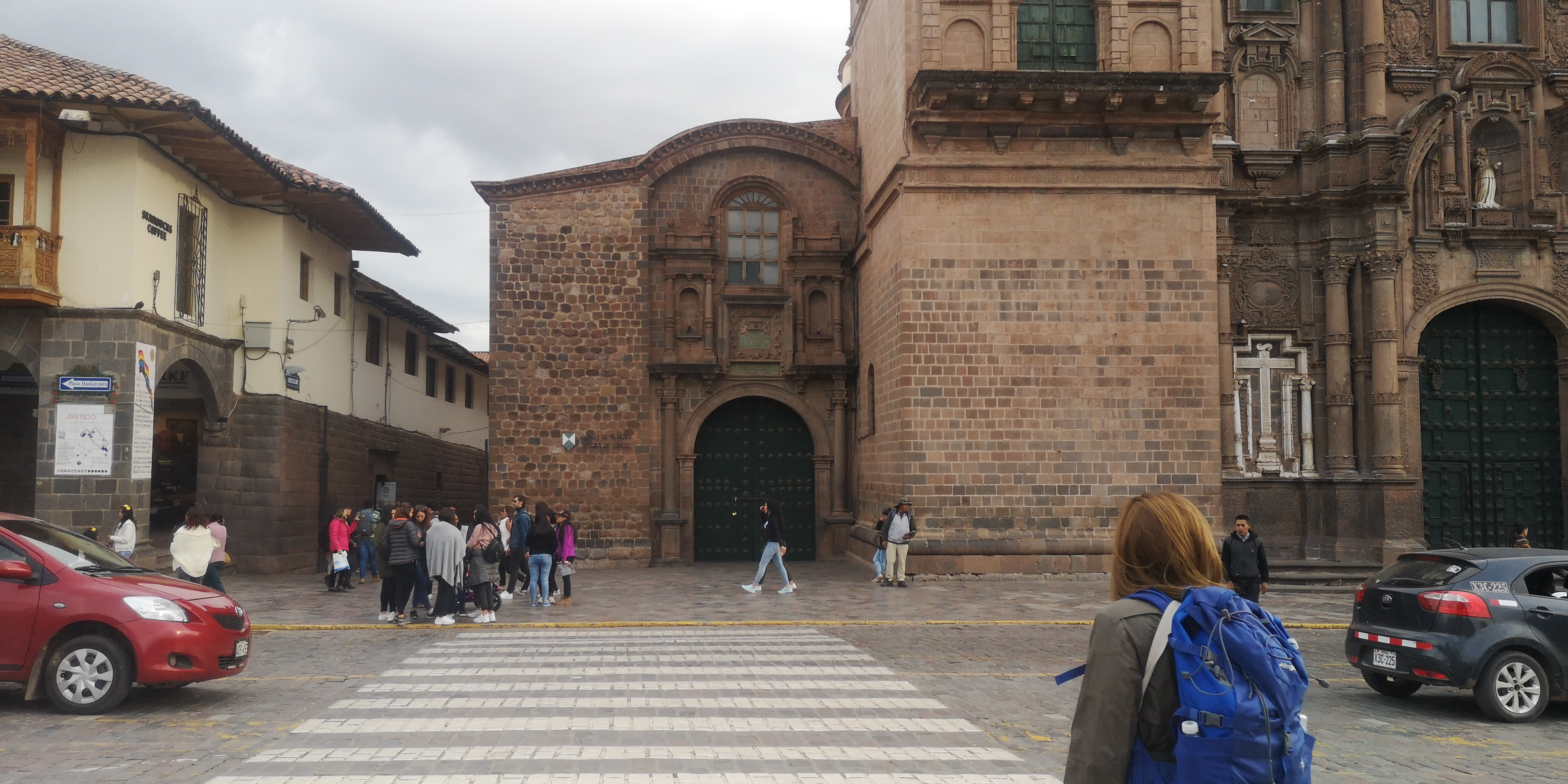 Vista de la portada de la Capilla Loreto en el Cusco, Perú